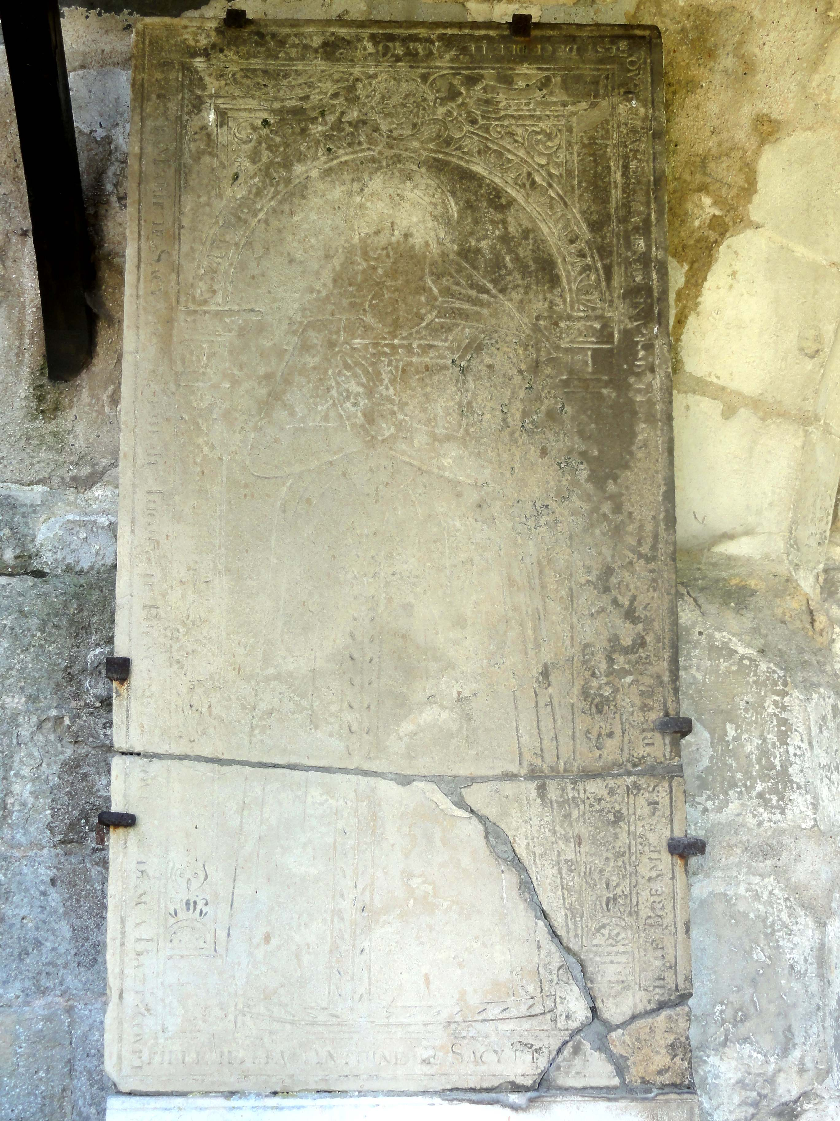 Église Saint-Nicolas de Bazicourt, dalle funéraire à effigie gravée de Marie de Sacy.